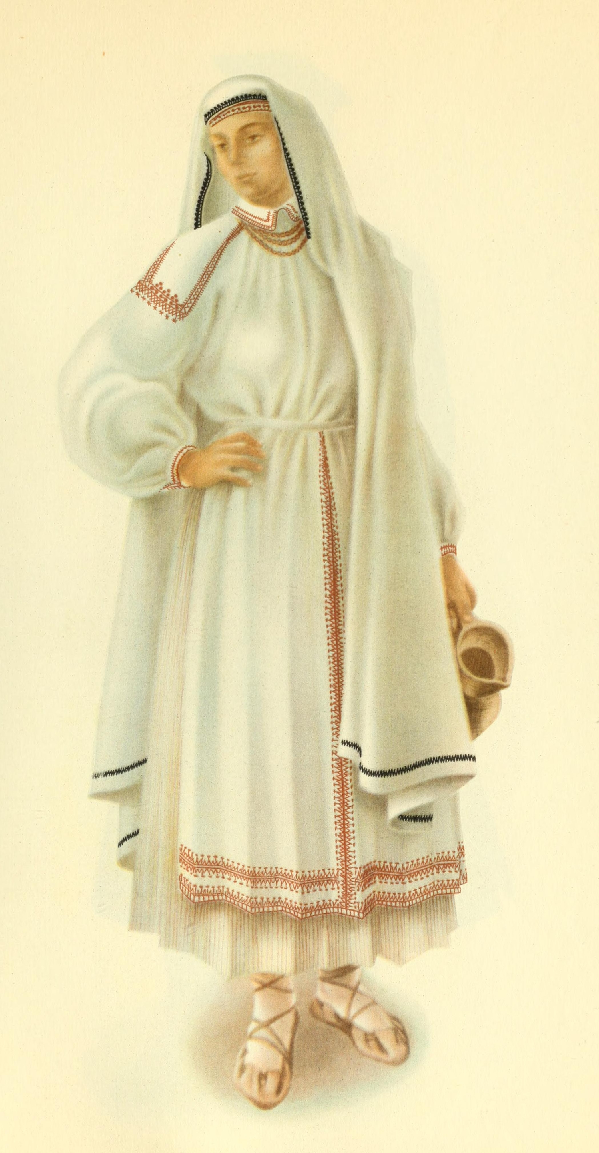 Strój lubelski (biłgorajski)